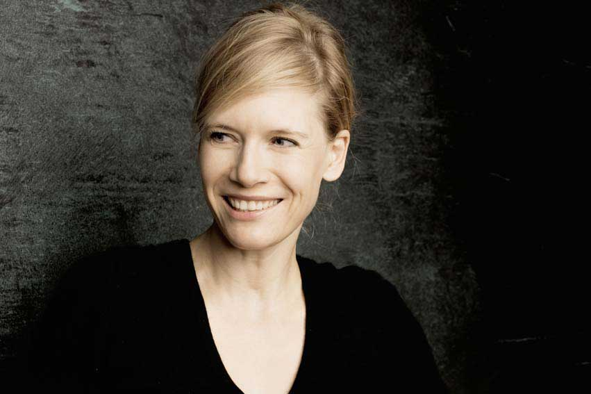 © Jim Rakete/photoselection